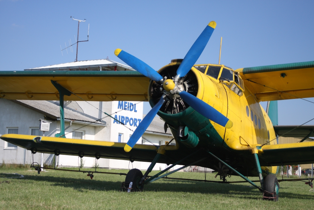 AN2-es légi permetező Fertőszentmiklóson